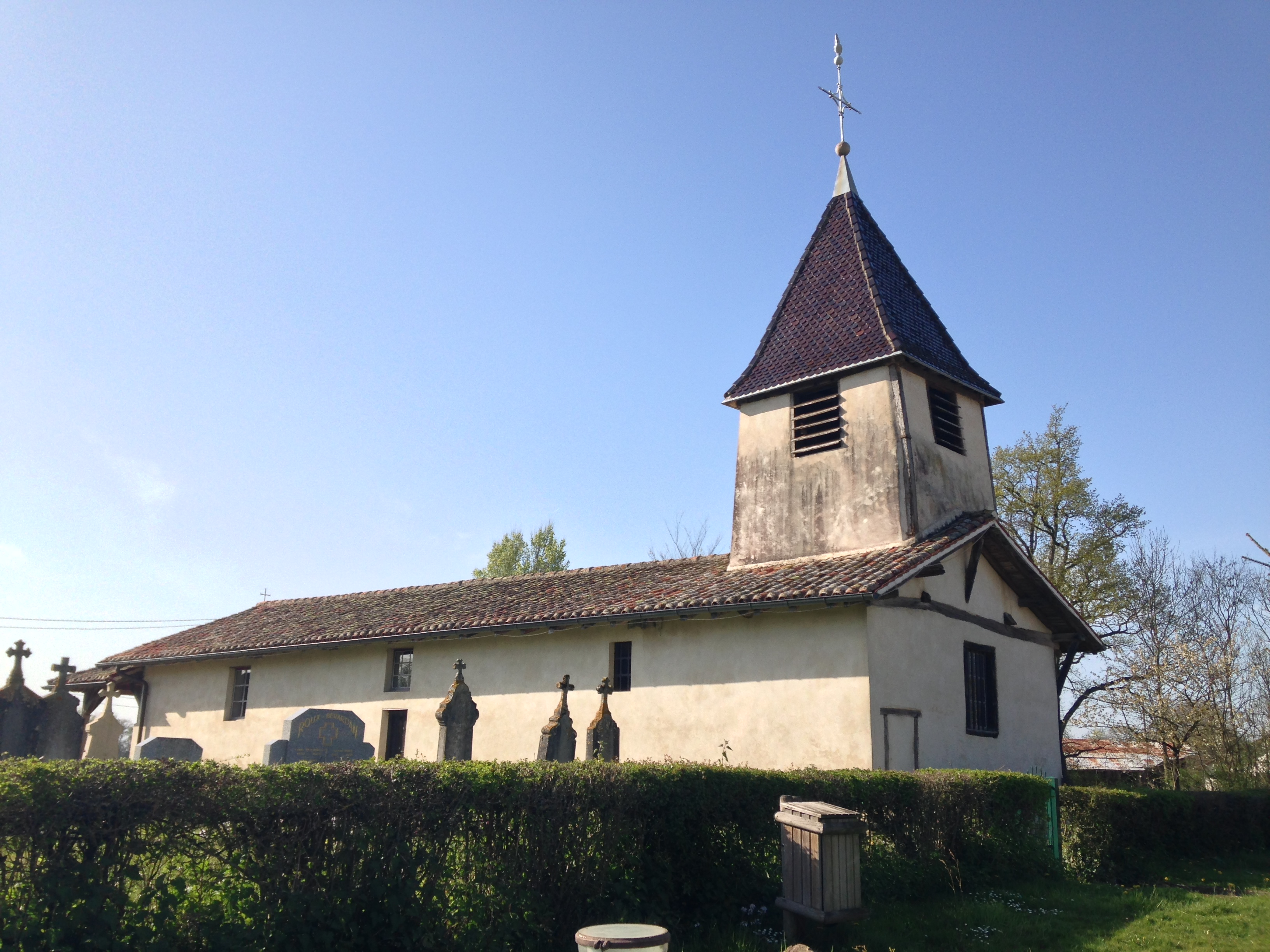 Église de Saint Sulpice dans l'Ain